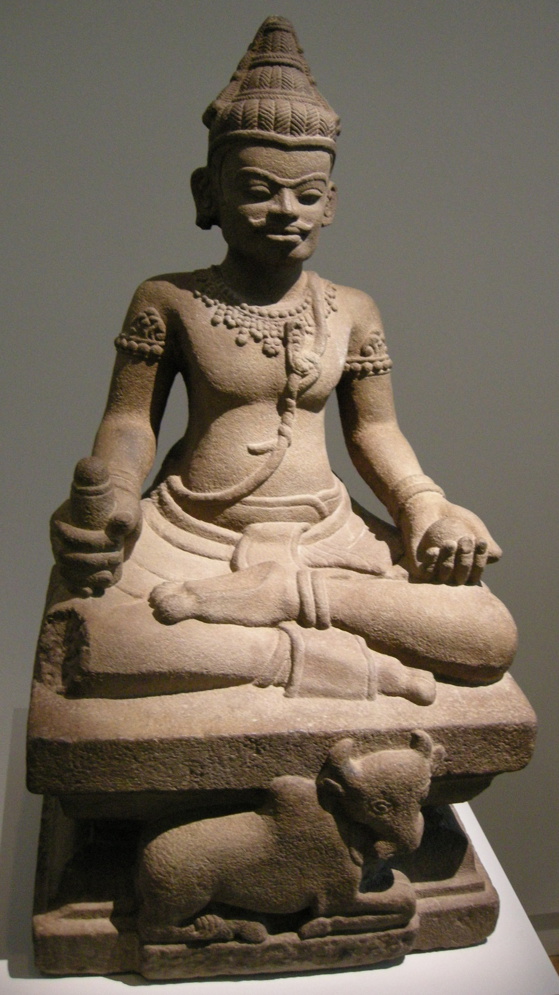 vietnam champa, shiva seduto, IX-X secolo